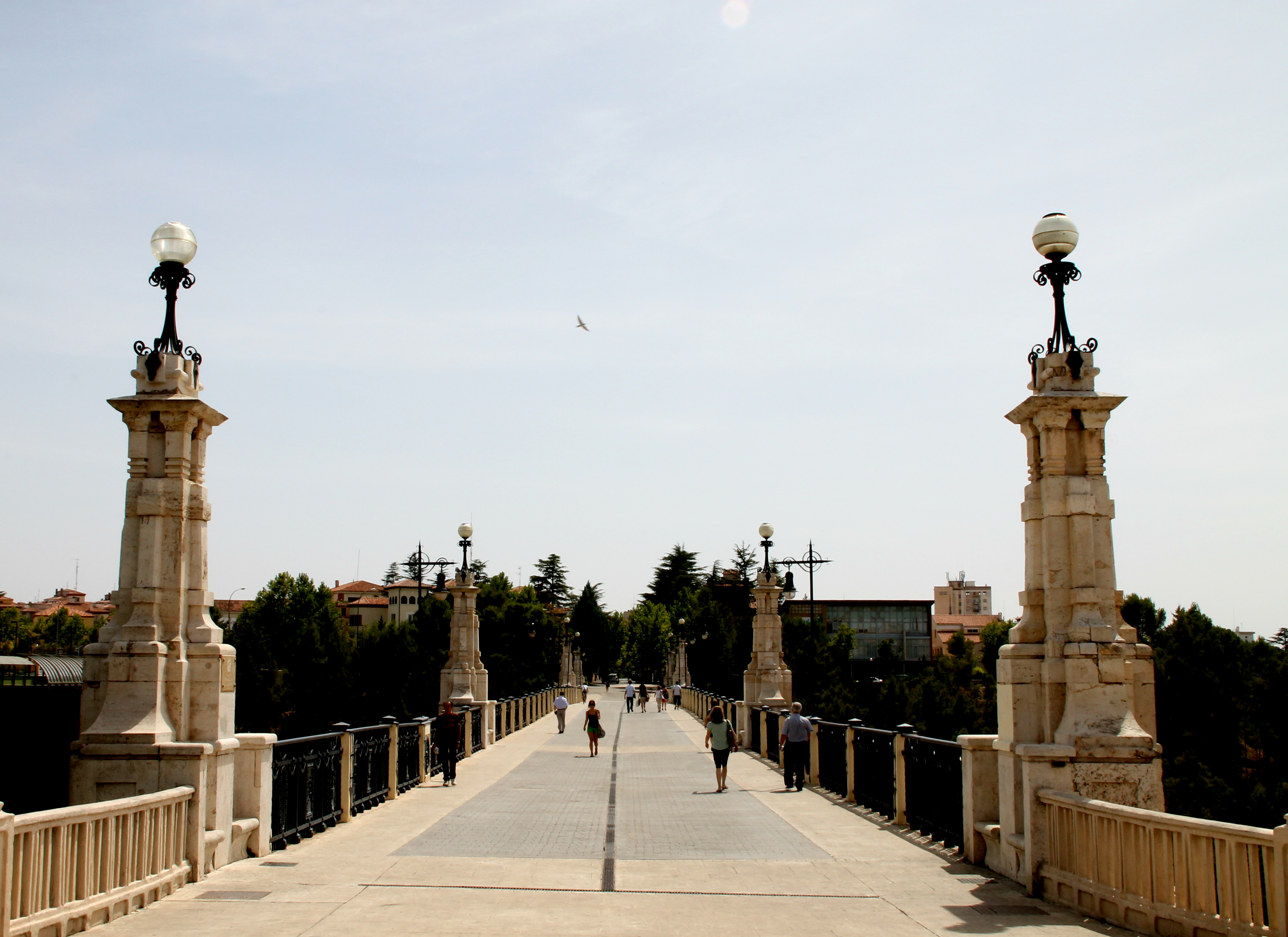 Viaducto Viejo, Teruel.